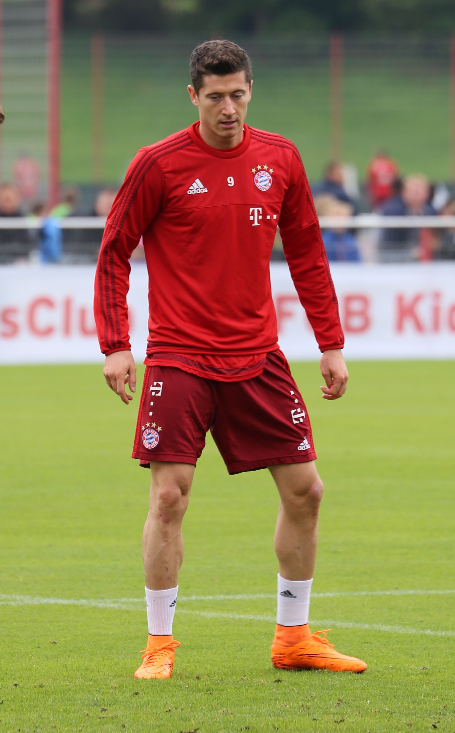 Robert Lewandowski beim Training auf dem Gelände des FC Bayern München